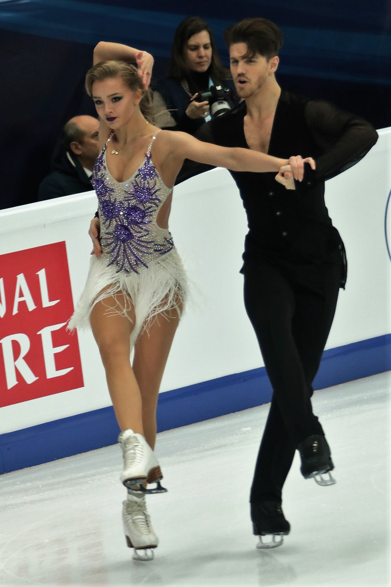 Александра Степанова / Иван Букин (Россия) на Чемпионате Европы по фигурному катанию 2018.